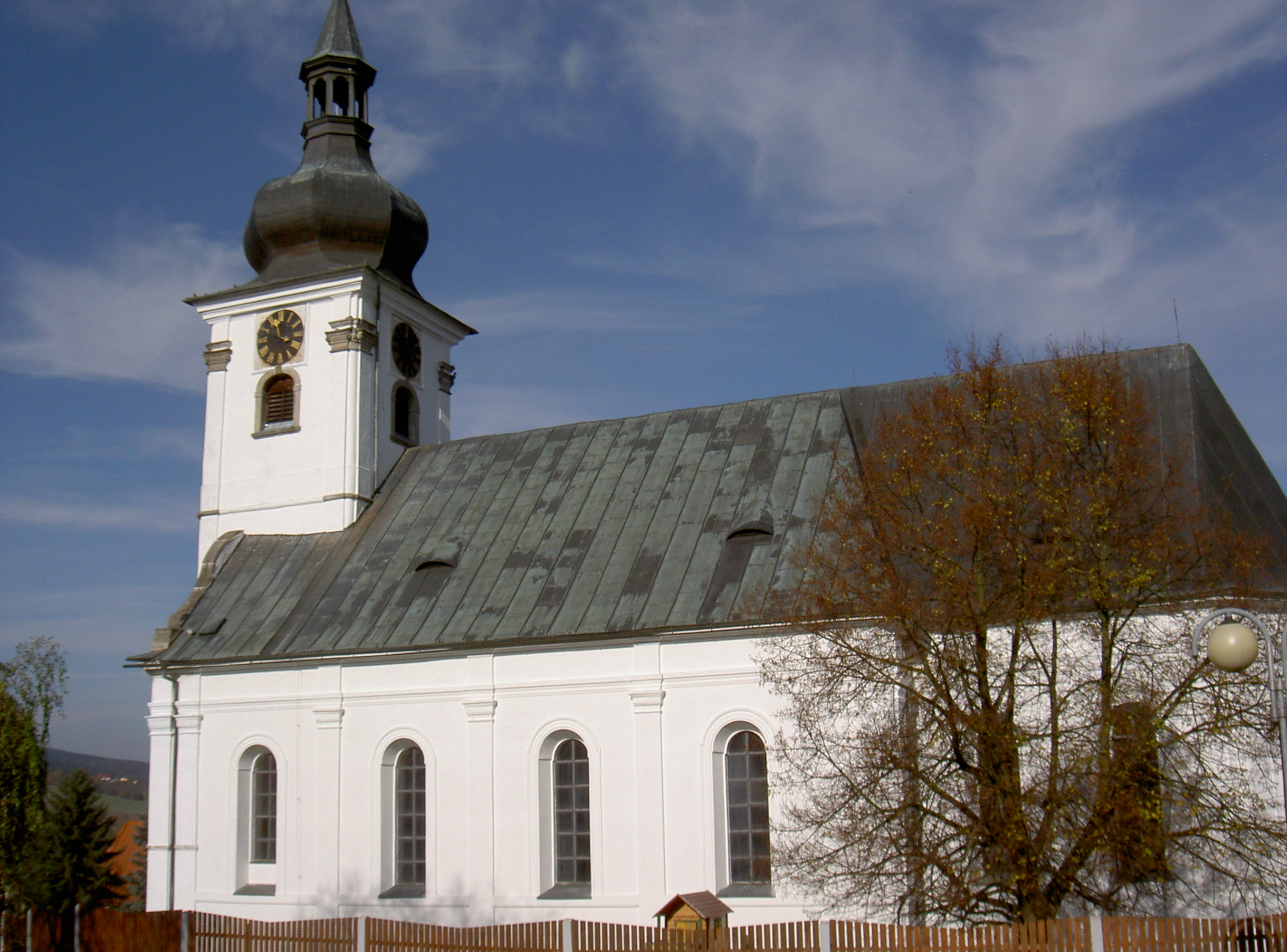 Kirche St. Martin in Klenčí pod Čerchovem